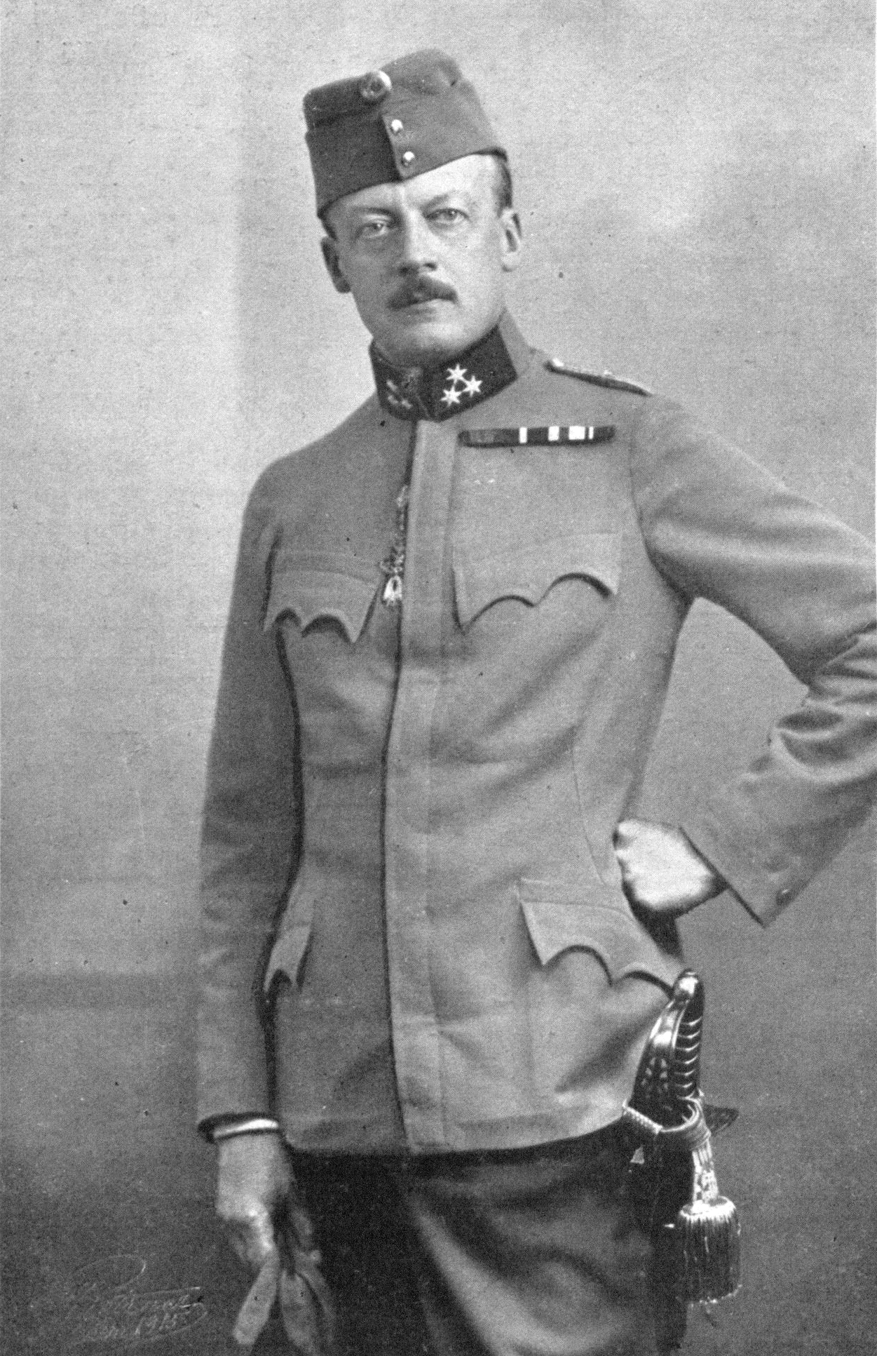 Leopold Graf Berchtold von und zu Ungarschitz (1863-1942), Austrian-Hungarian politician